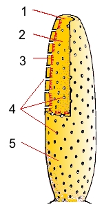 Ascon